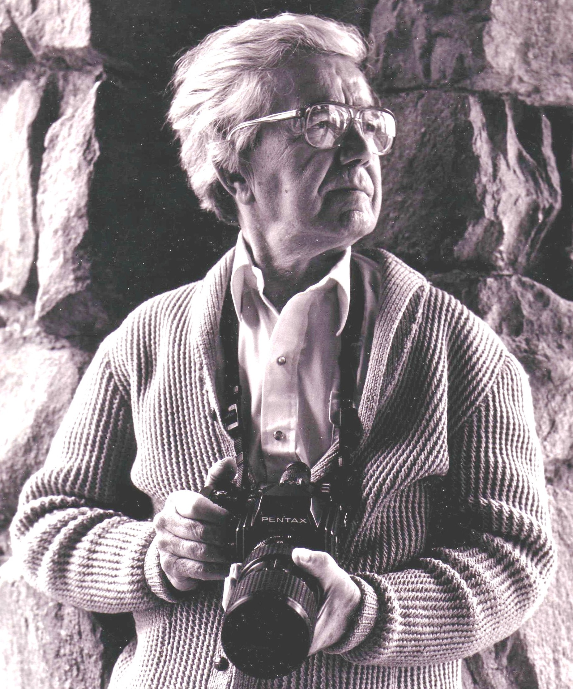 Eugene Sternberg